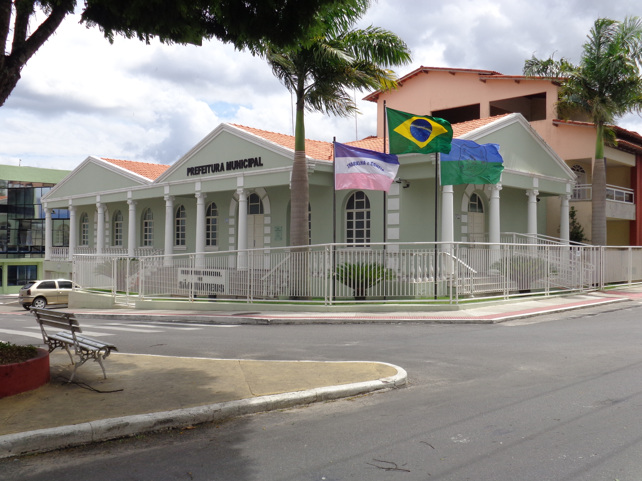 Prédio da Prefeitura de São Mateus-ES